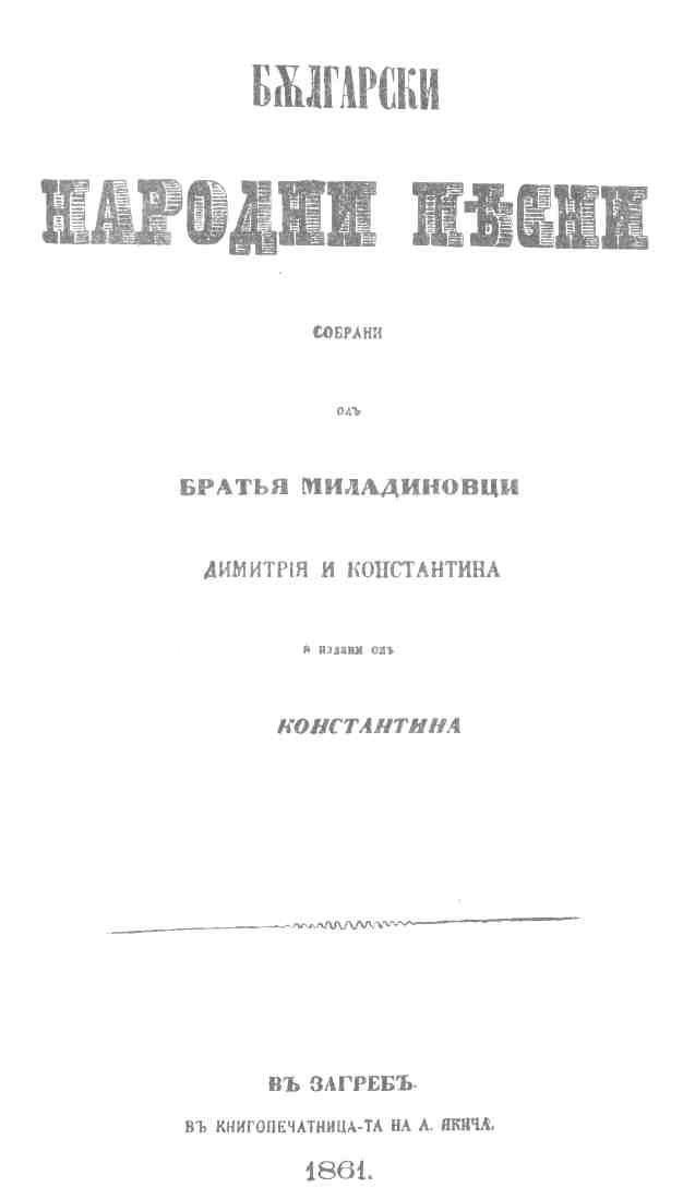 Български „Бѫлгарски народни пѣсни. Собрани отъ братья Миладиновци, Димитрıя и Константина и издадени отъ Константина. Въ Загребъ. Въ книгопечатница-та на А. Якича, 1861“ English Front page of „"Bulgarian Folk Songs collected by the Miladinov Brothers Dimitar and Konstantin and published by Konstantin in Zagreb at the printing house of A. Jakic, 1861"“ by the Miladinov Brothers Македонски Браќа Миладиновци, „Български народни песни“